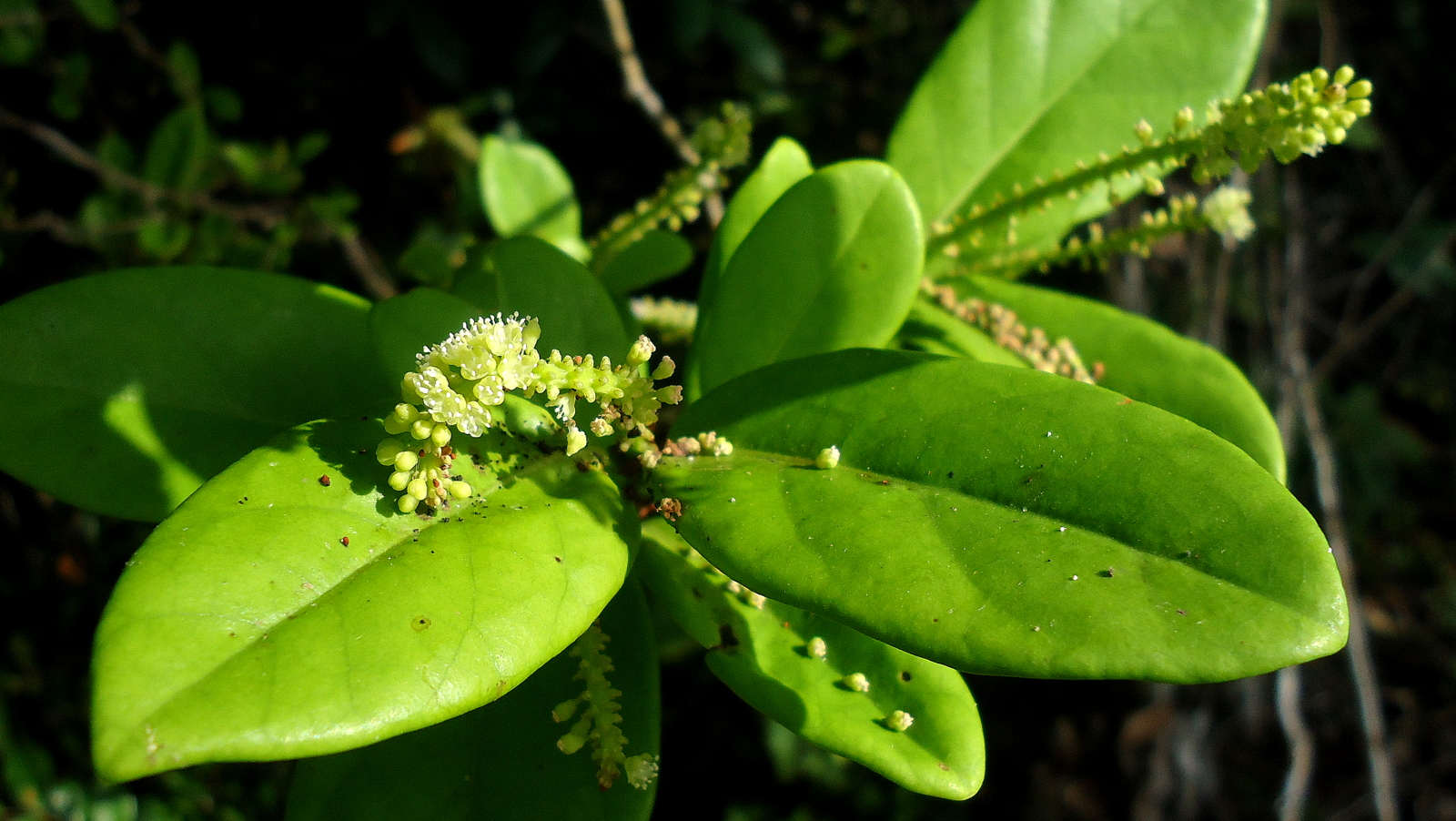 Coccoloba ochreolata Wedd.